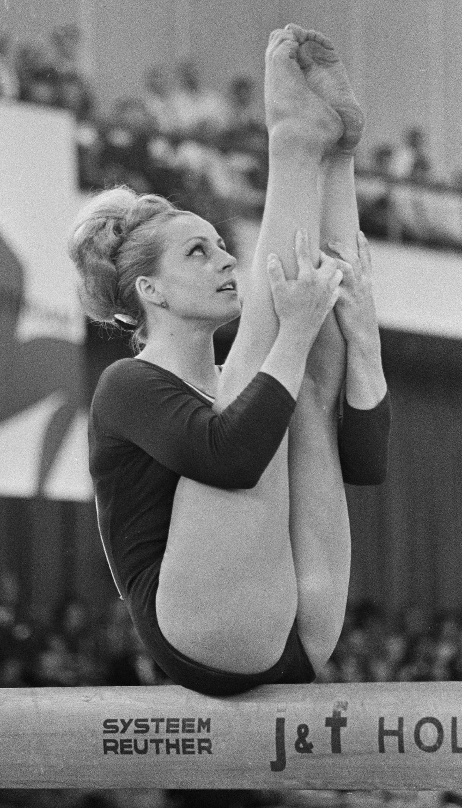 Věra Čáslavská at the European Championships